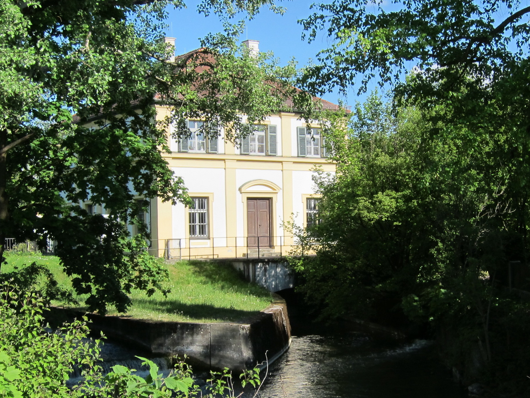 Schloss Schleißheim, Brunnhaus